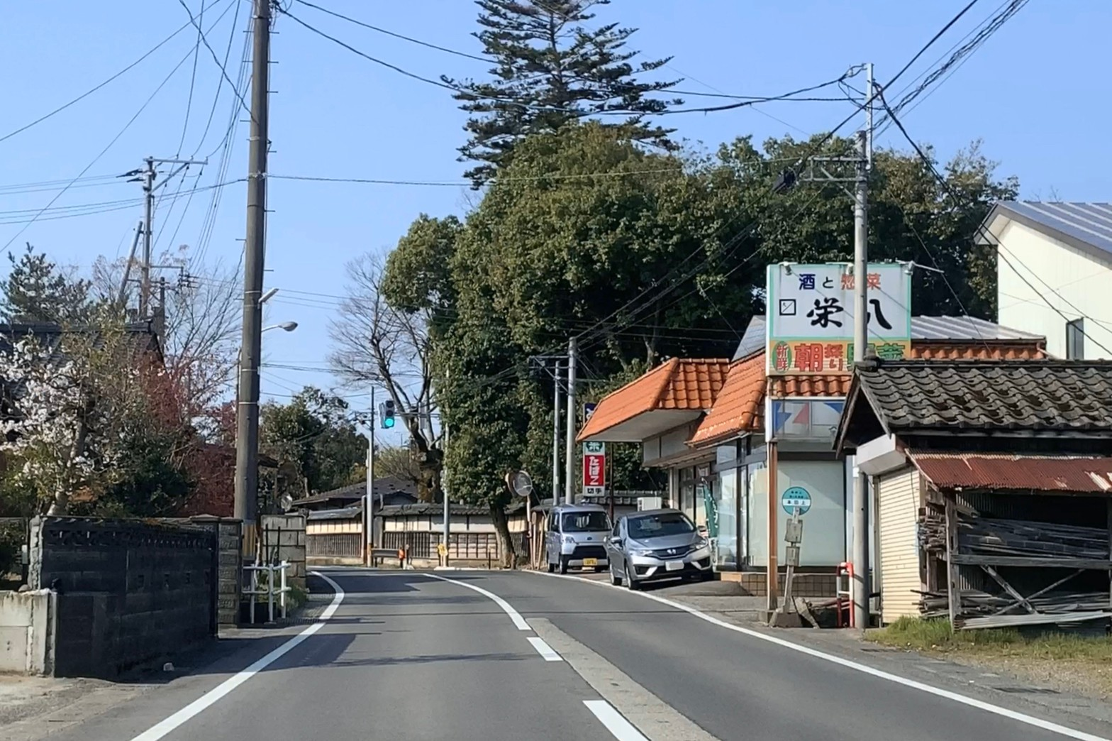 国道403号 「本田上」バス停付近（新潟県田上町，2020年4月）